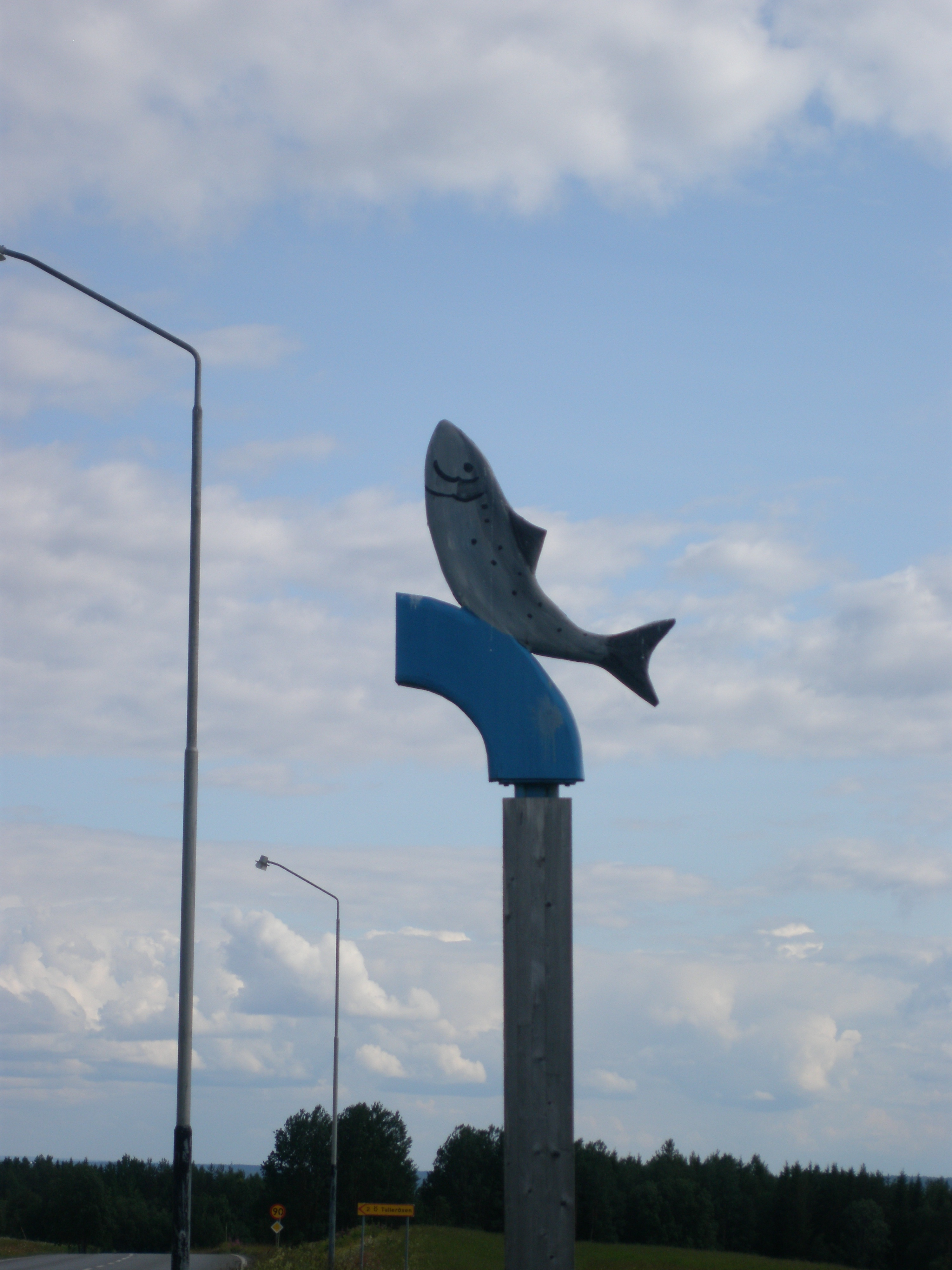 Fiskevägen (väg 340), Tulleråsen, Offerdals socken, Krokoms kommun, Jämtland, Sverige.